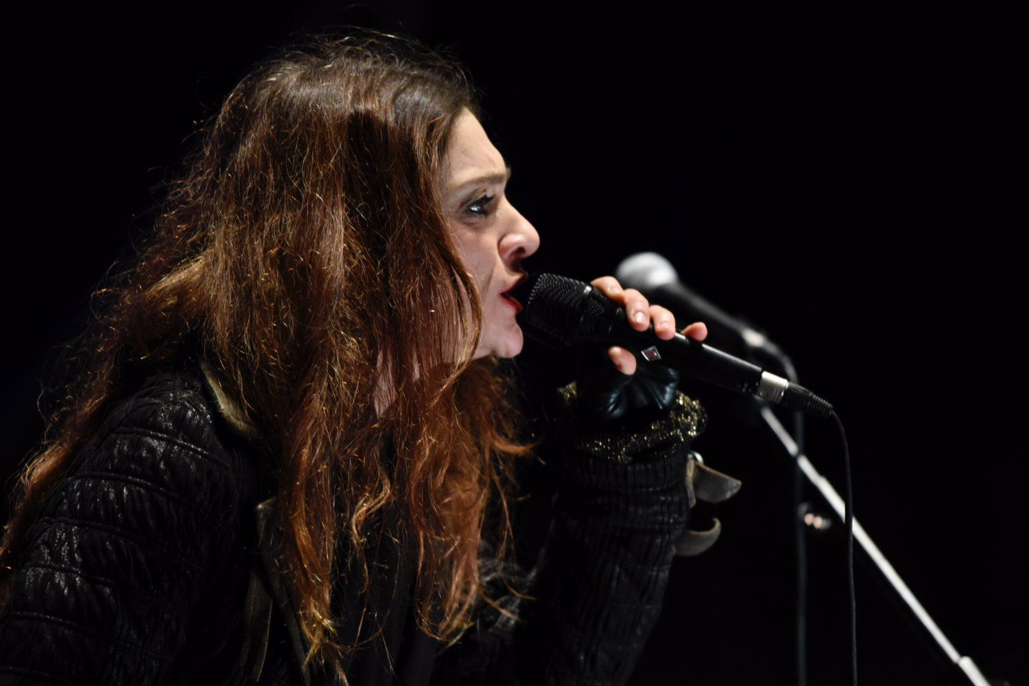 Las mujeres músicas también han alzado su voz en las celebraciones en torno al Día Internacional de la Mujer. Este sábado, 10 de marzo, la Plaza Mayor ha albergado el concierto Un susurro atronador cuyo hilo conductor han sido las mujeres como intérpretes, como compositoras, como creadoras. El espectáculo ha contado con las jóvenes voces de Andrea Motis, Rita Payes y Magalí Datzira, que han ofrecido su personal interpretación de grandes figuras del jazz, como Billie Holiday o Nina Simone. La italiana Cristina Zavalloni ha reivindicado a través de temas internacionales la resistencia de las mujeres frente a la desigualdad. Elsa Rovayo, “La Shica” ha ofrecido la visión del coraje femenino a través de la copla.